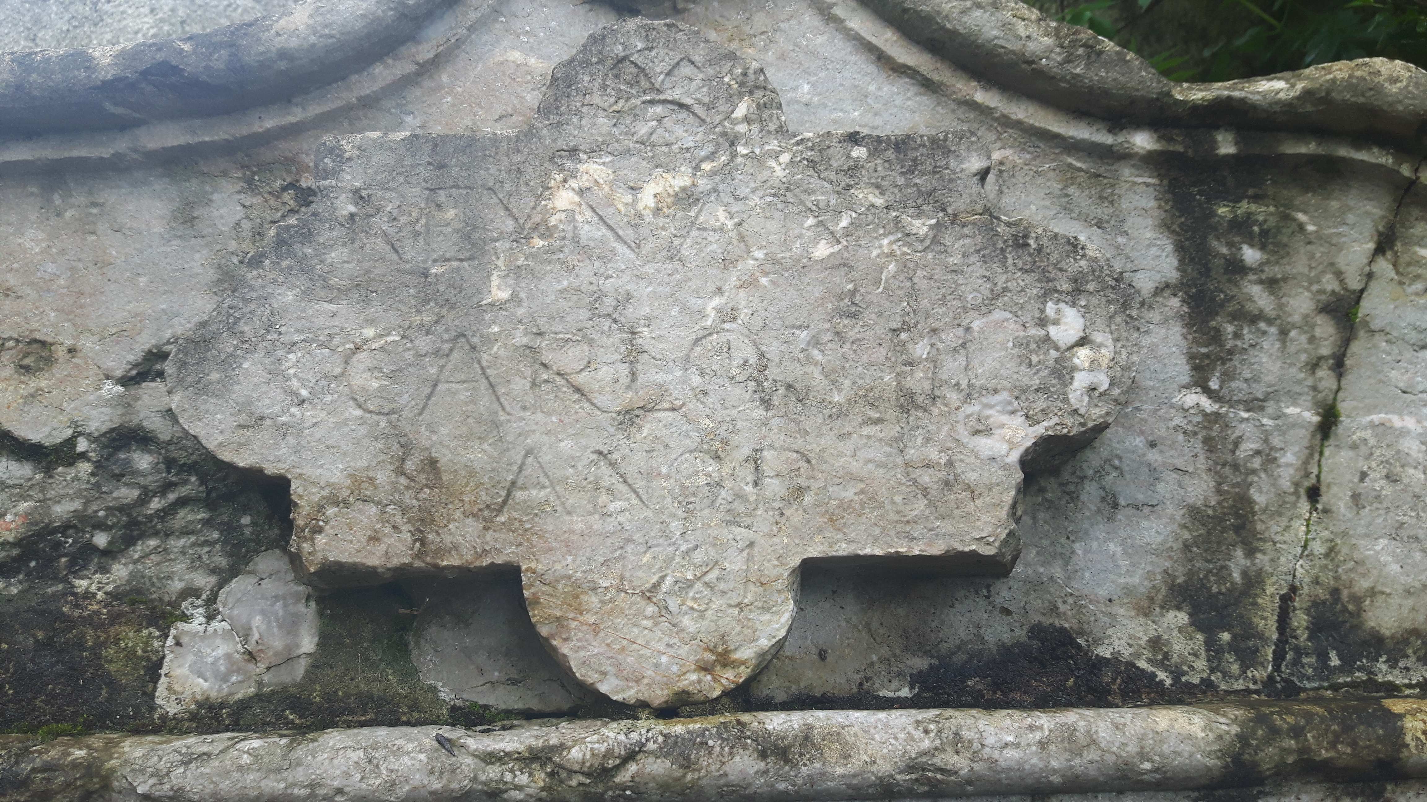 Placa vieja de la fuente de la Fontana, Pravia, Asturias.